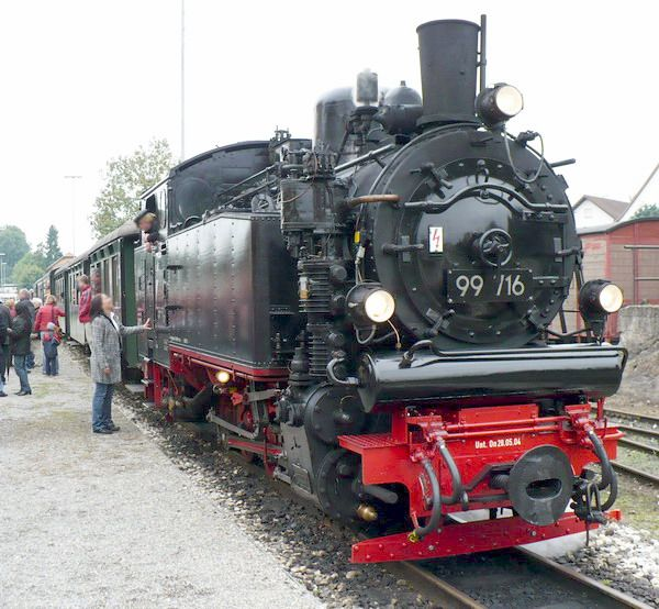 Oechsle-Lokomotive Nr. 99 716 Rosa in Ochsenhausen, Deutschland